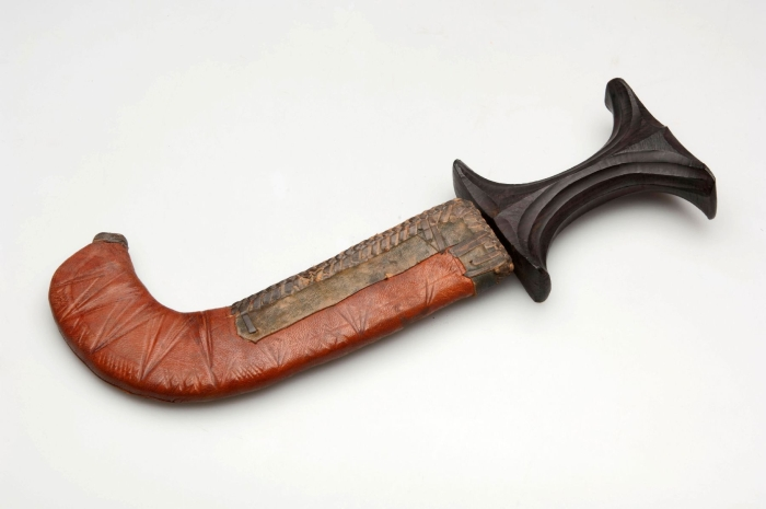 Dit object is afkomstig van de Bicharin Bega in de Nubische woestijn, Egypte.